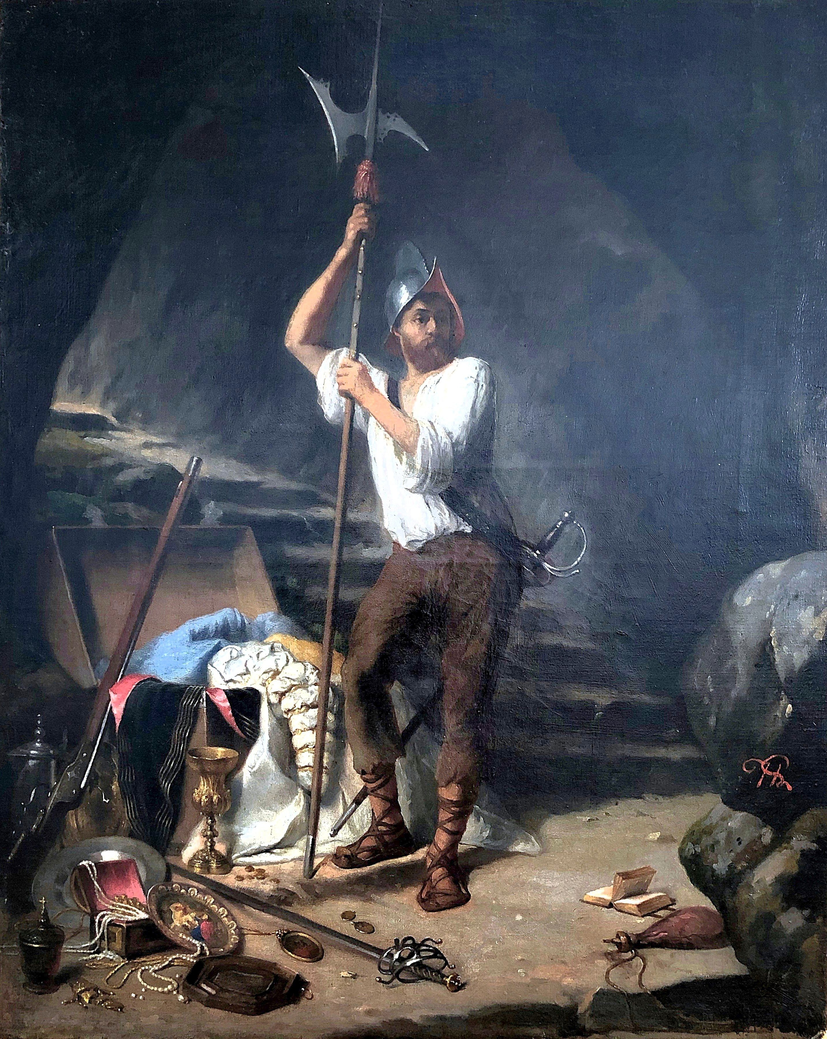 Tableau " Le gardien du trésor " huile sur toile, dans le style romantique. Vers 1830 / 1850 Signature monogrammée rouge en bas à droite. 56cm x 45cm Style : Autre style Etat : B